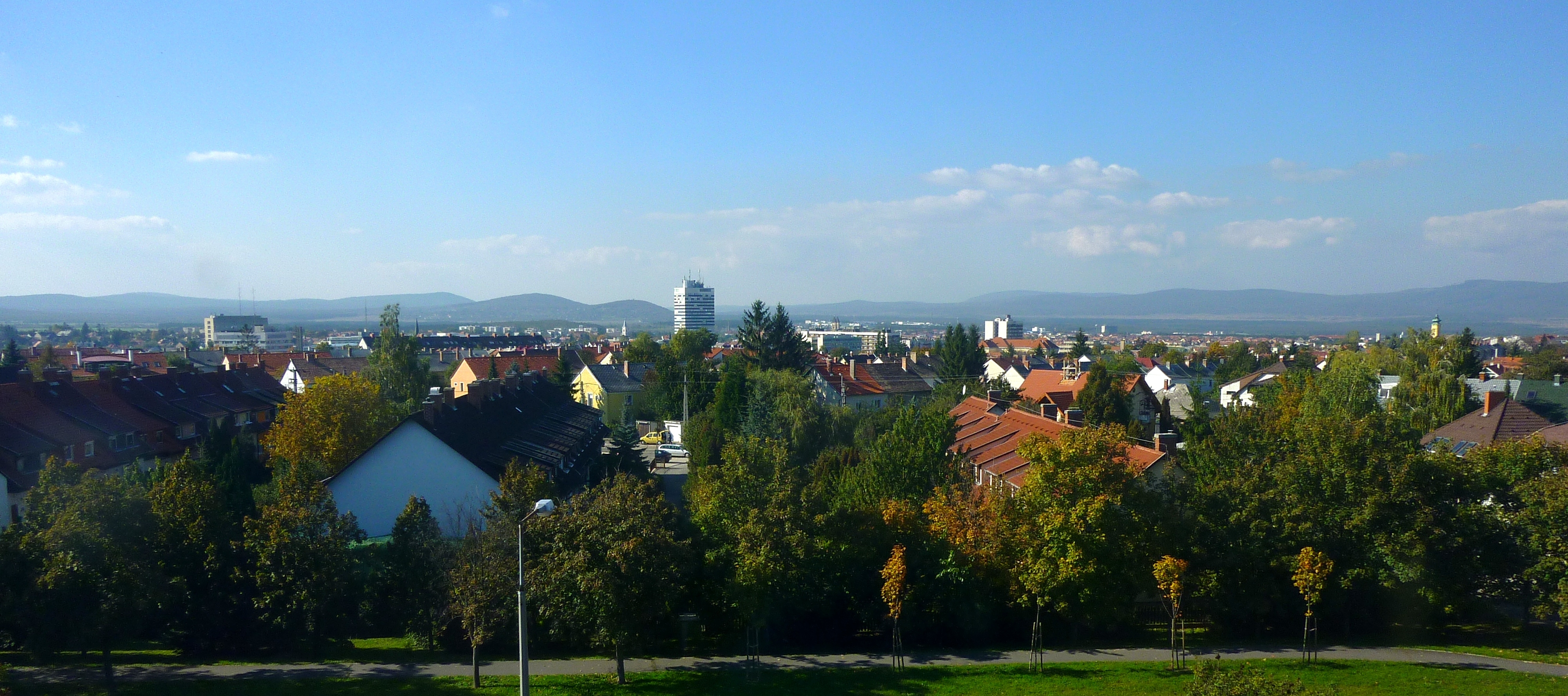 Veszprém városközpontjának panorámaképe Cholnokyváros felől